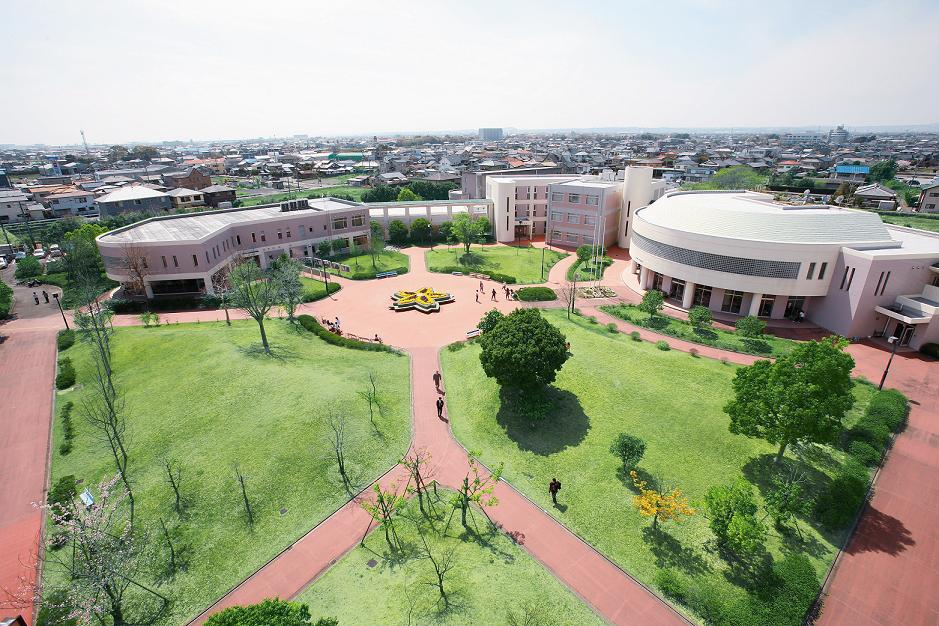 静岡福祉大学のキャンパス風景